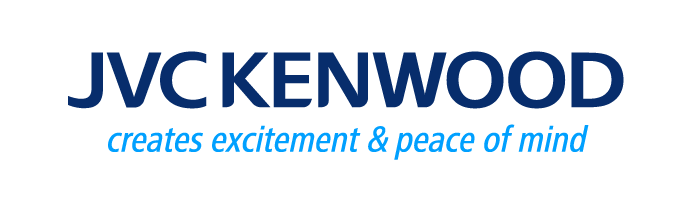 JVCKENWOODのロゴ